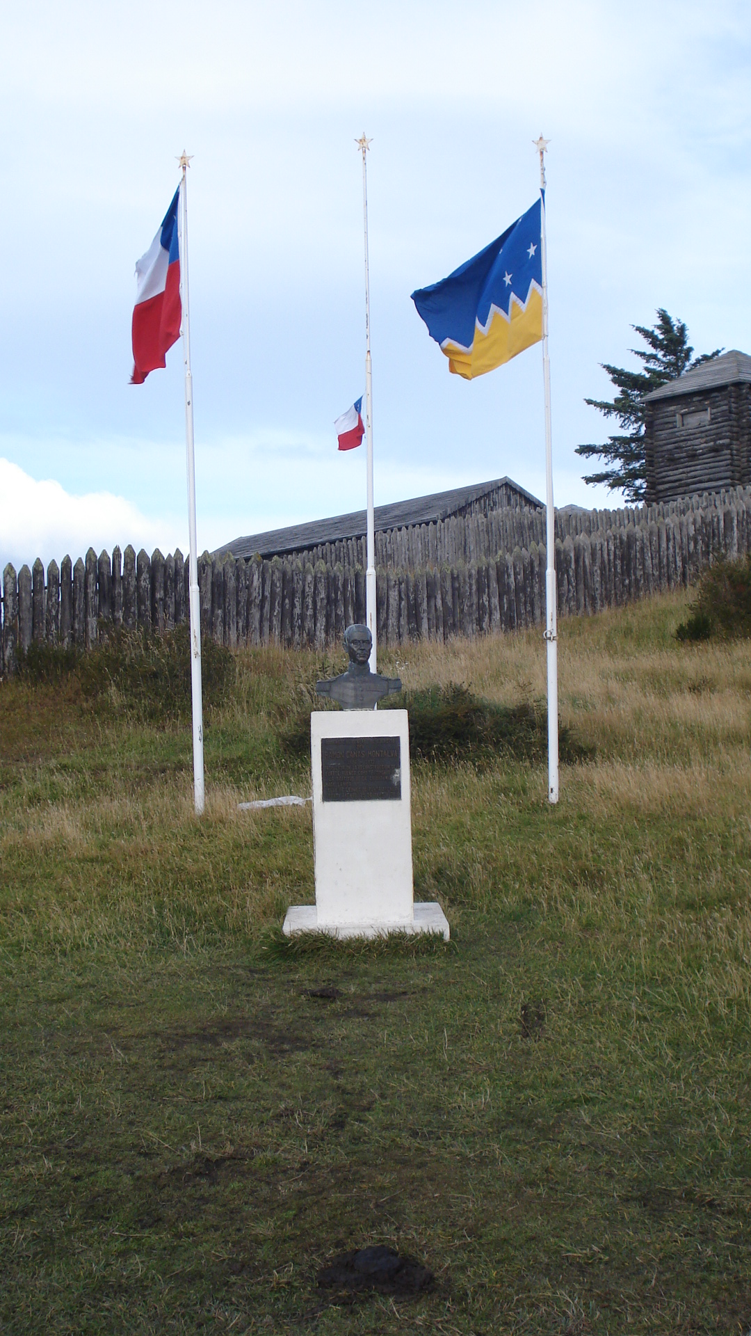 Monumento de Ramón Cañas Montalva (location? sculptor? year of installation?)